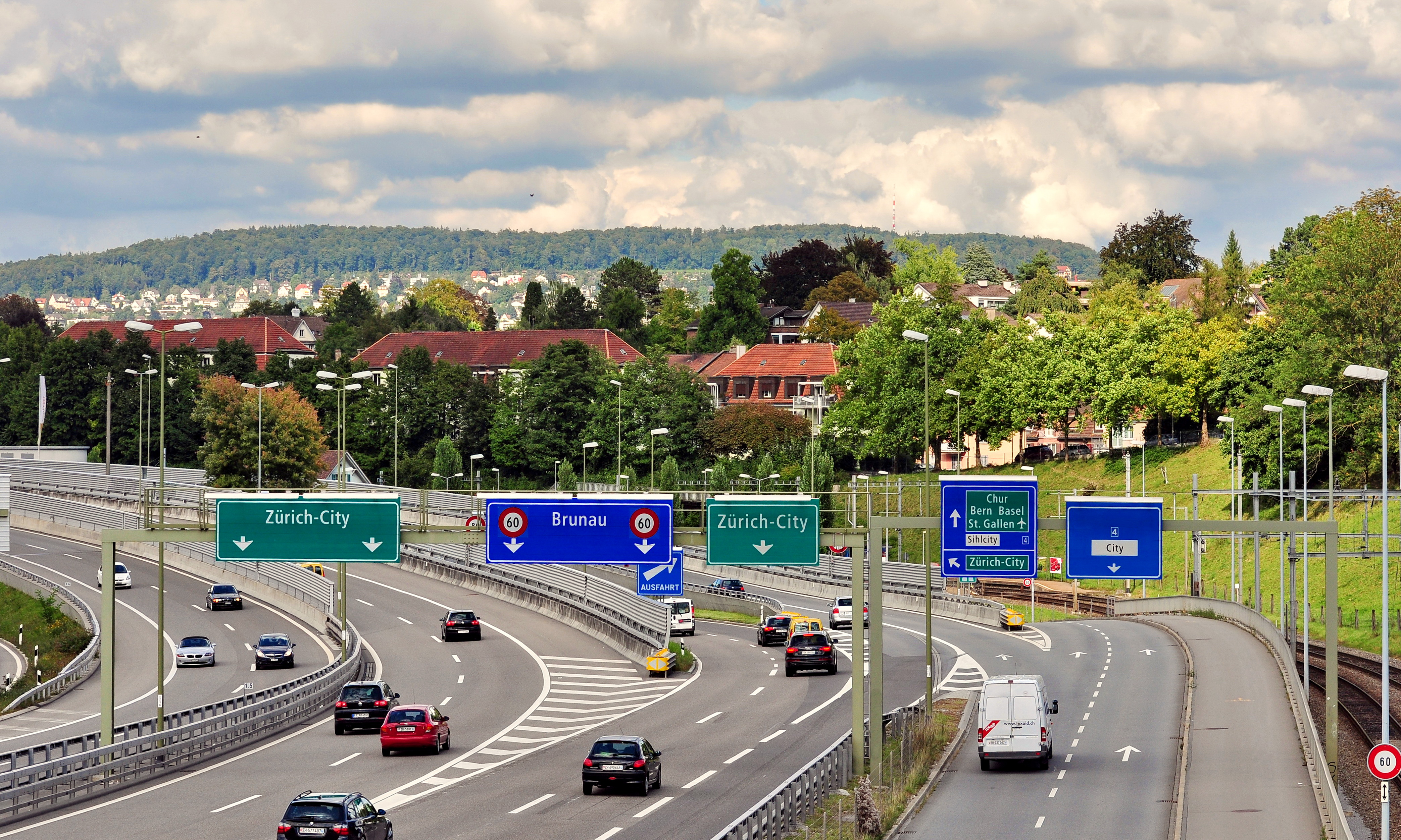 A3 in Zürich-Wollishofen / Brunau (Switzerland), Käferberg in the background.